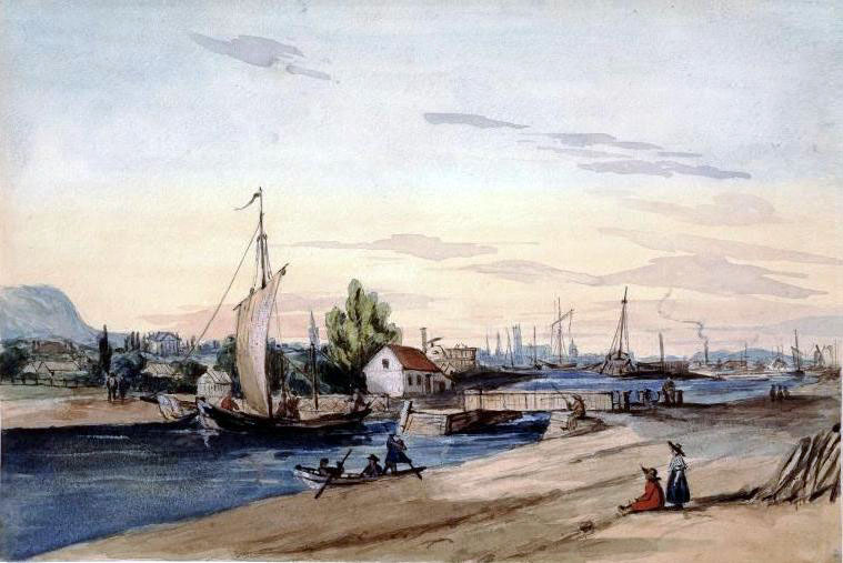 Lachine Canal, Lachine, QClabel QS:Len,"Lachine Canal, Lachine, QC"label QS:Lfr,"Le canal Lachine"